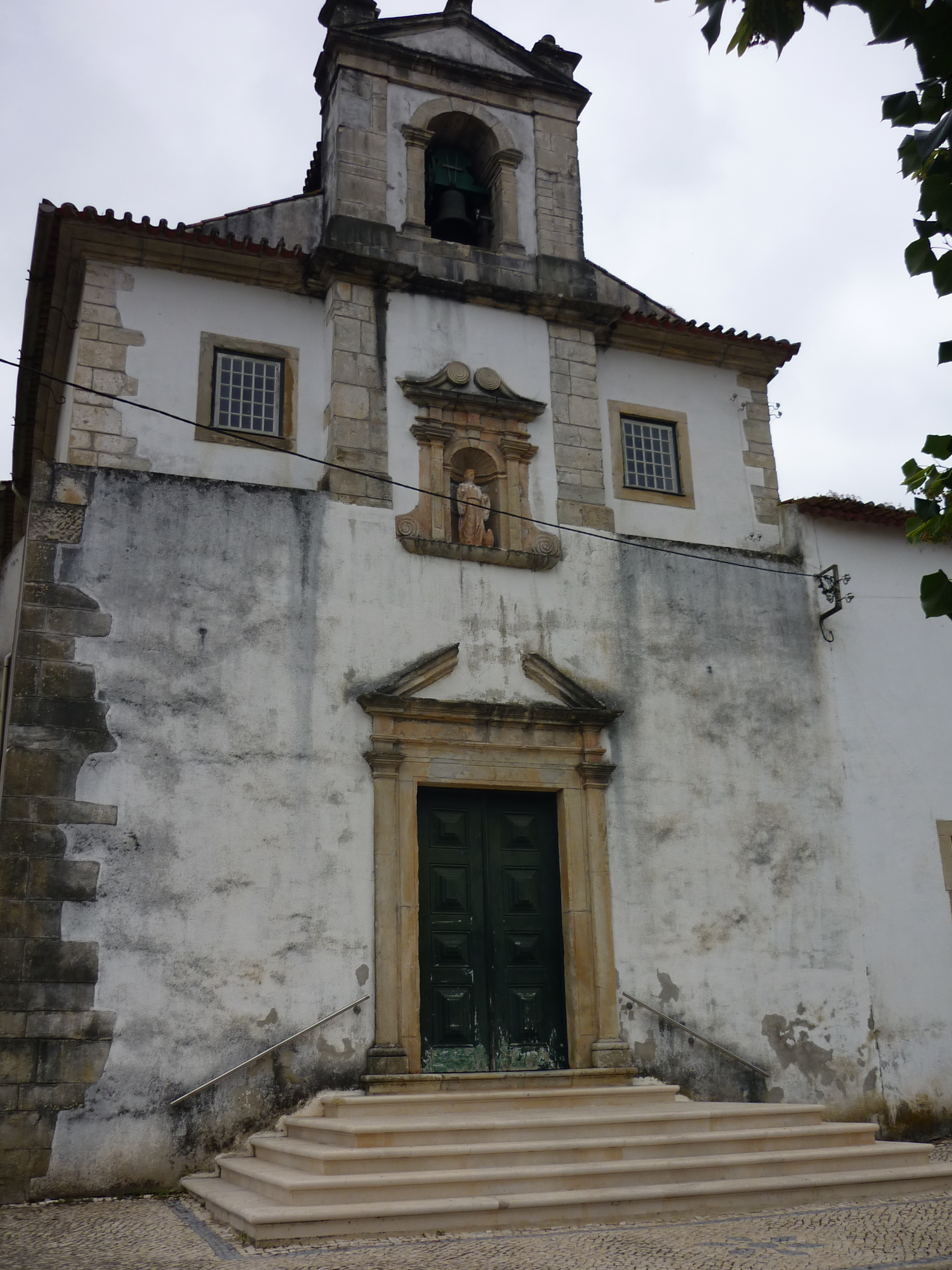 Kirche Sao Paulo de Frades, Westfront